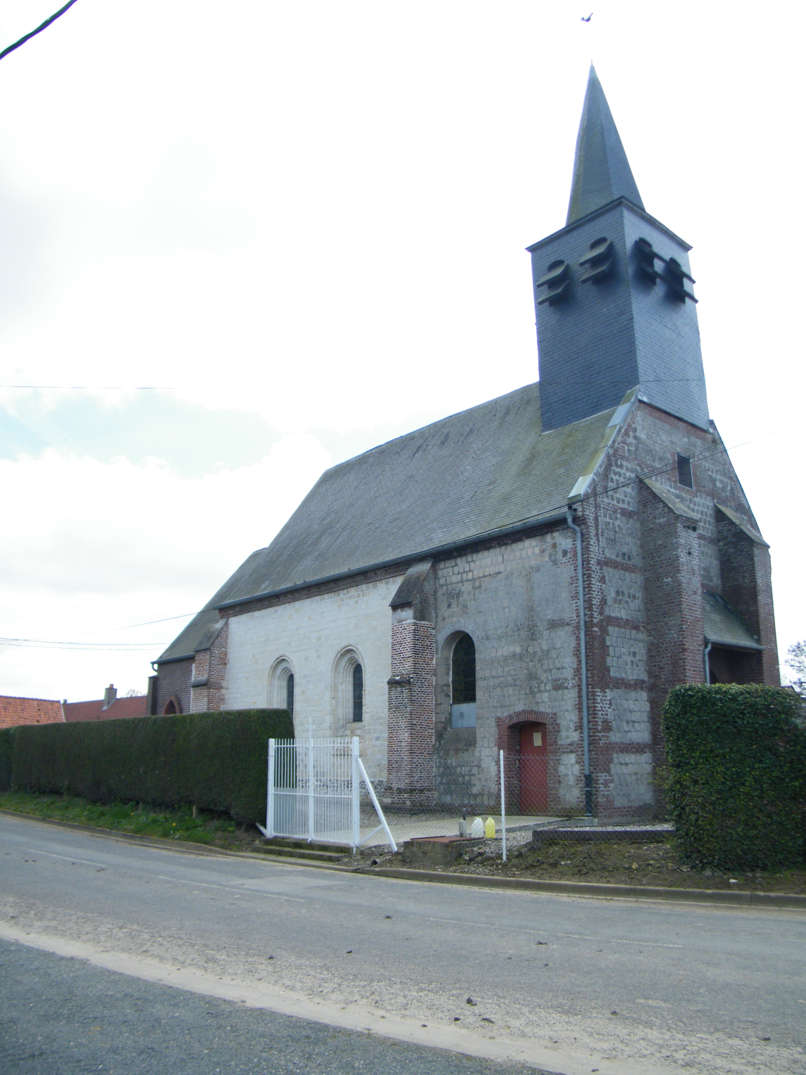 le côté nord de l'église.